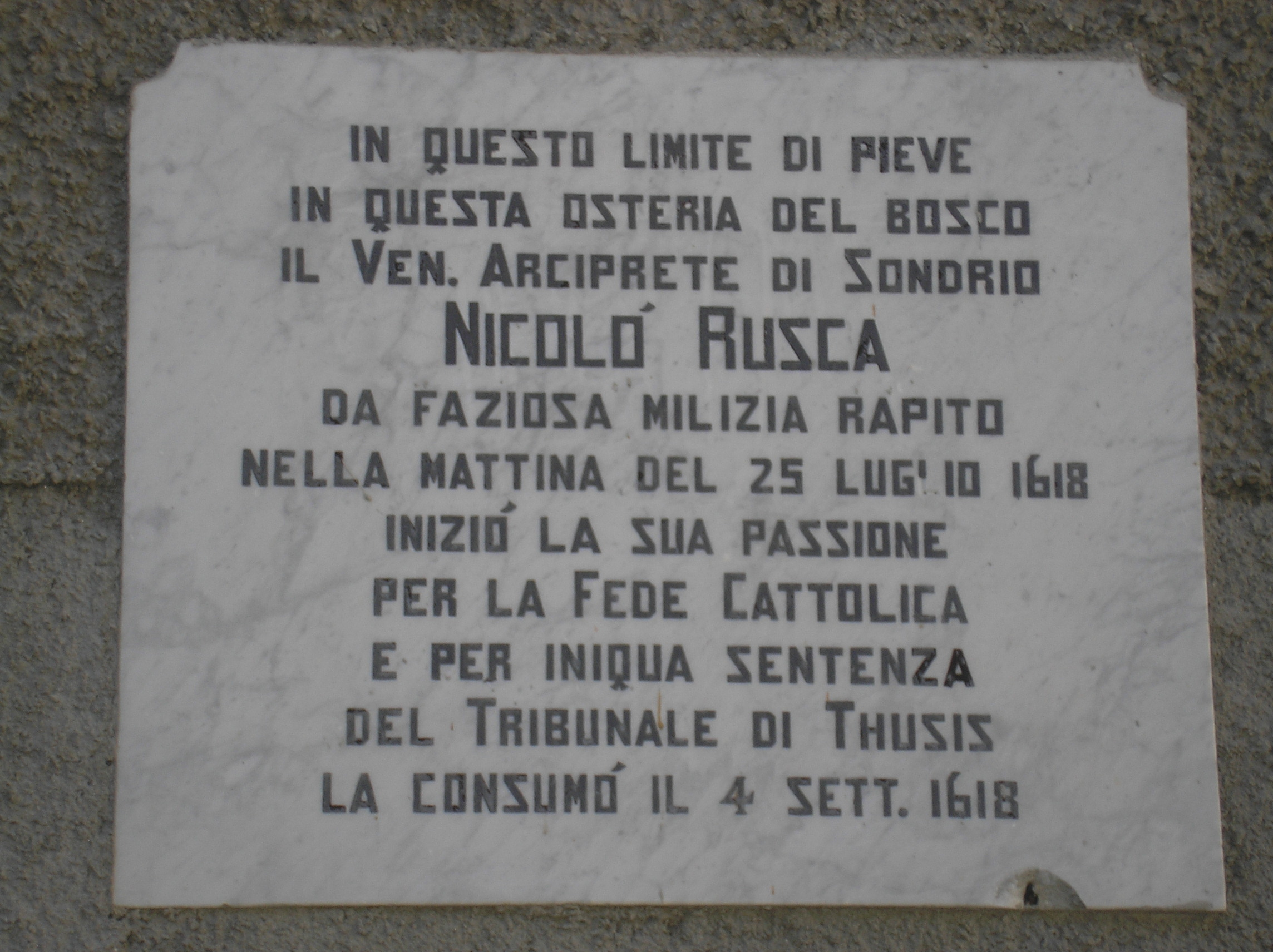 Lapide in ricodo di Nicolò Rusca a Chiesa in Valmalenco.